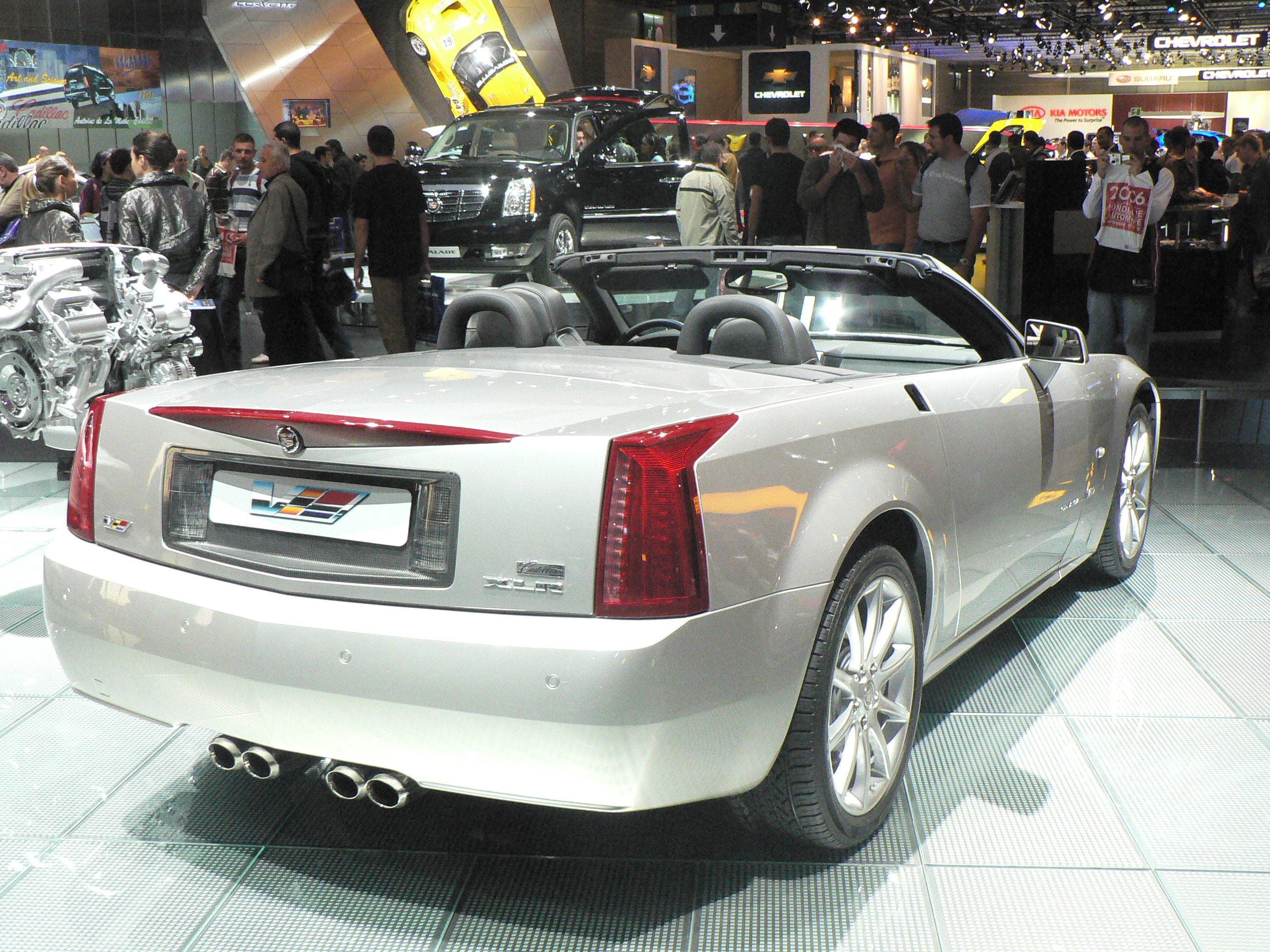 Mondial de l automobile de Paris (October 2006)